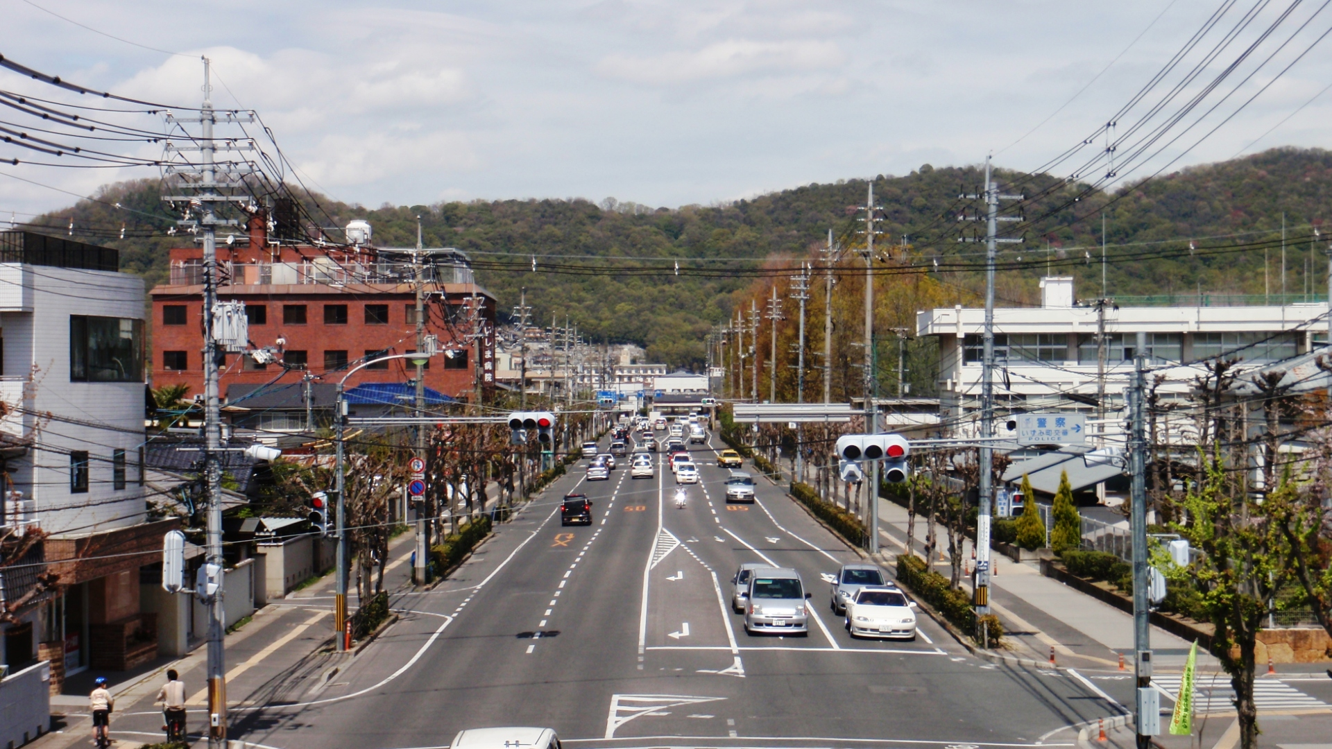 岡山県岡山市北区の島田筋の風景。伊島町一丁目付近から起点のいずみ町交差点を見る。